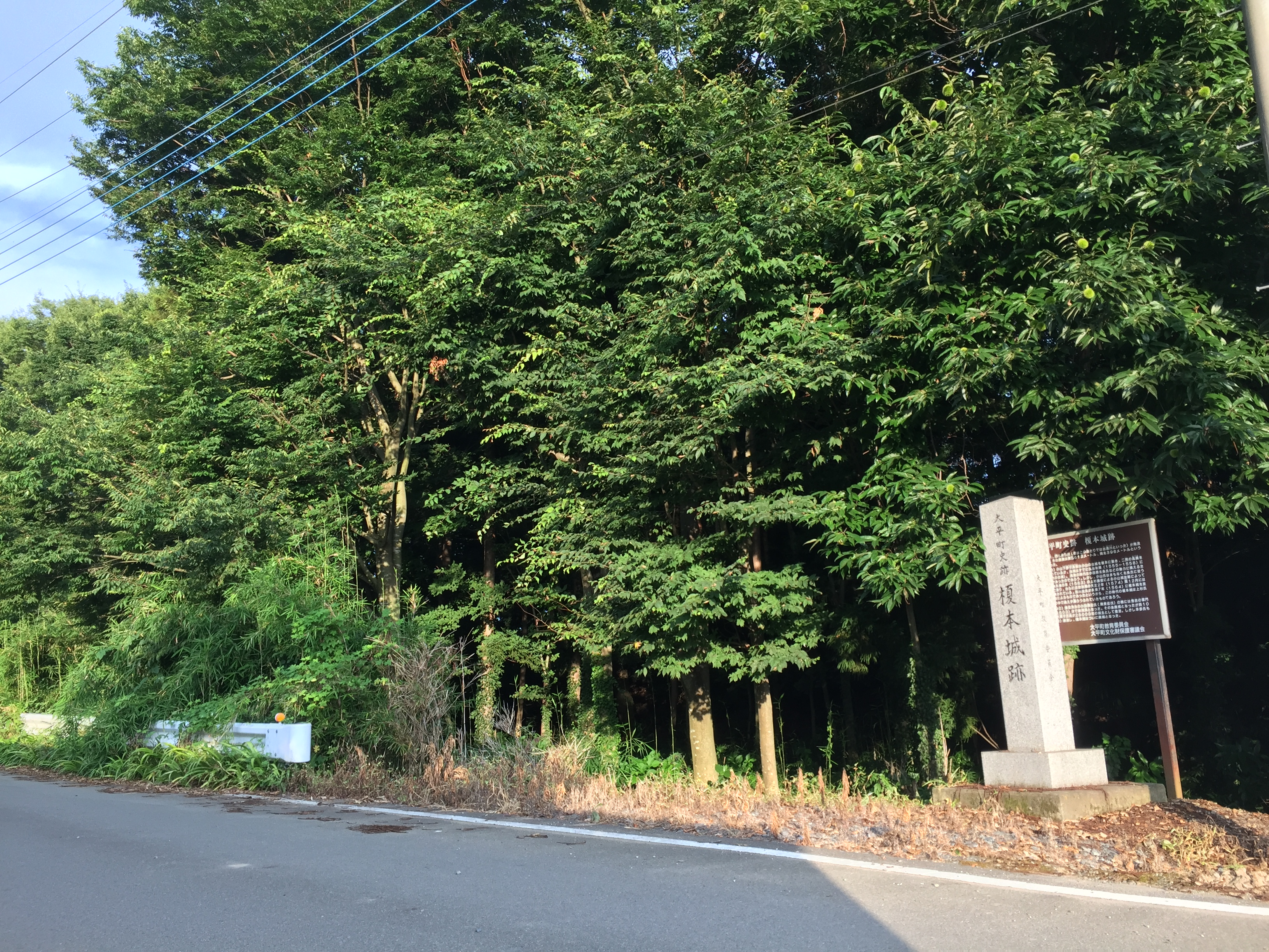 栃木県栃木市大平町真弓にある、榎本城跡。